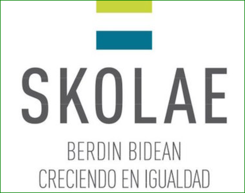 Nafarroako Gobernuaren hezkidetza programa da, 2019an UNESCOren Nesken eta Emakumeen Hezkuntzarako Nazioarteko Sariaren irabazlea.